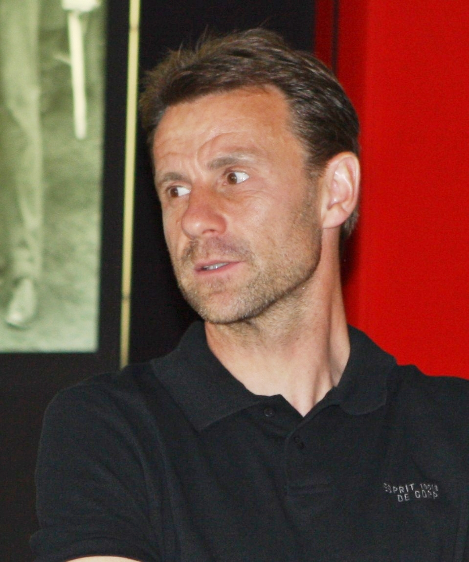 Manfred Binz im Eintracht Frankfurt Museum 2008